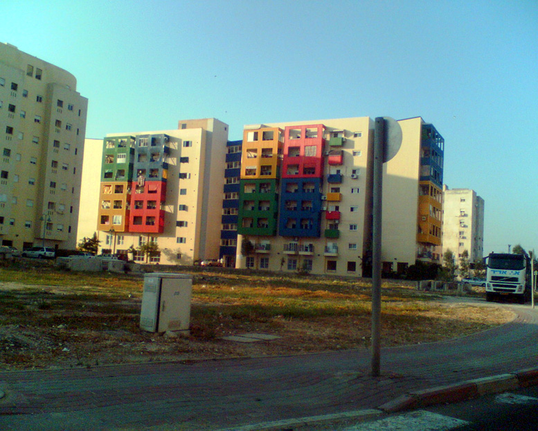 מבני מגורים בעלי חזות ייחודית בפרבריה החדשים של העיר עפולה